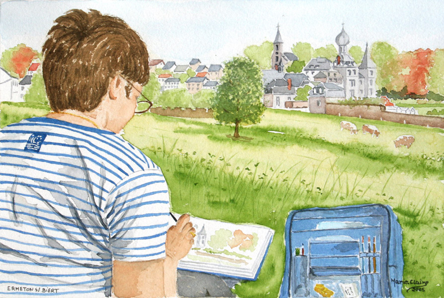 L'aquarelliste, Marie-Claire Lefébure